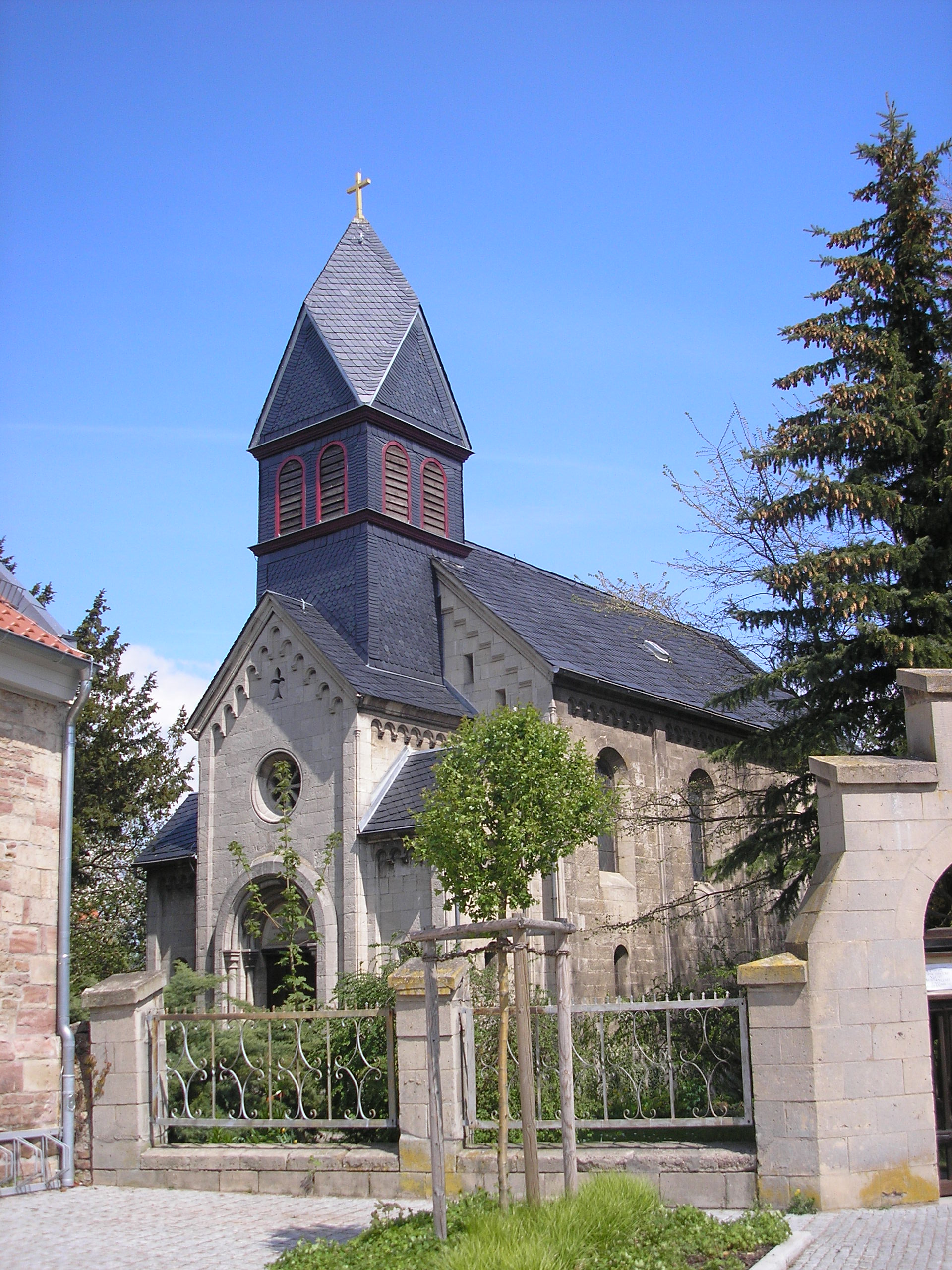 Die Gogathakirche in Heldrungen (Thüringen).